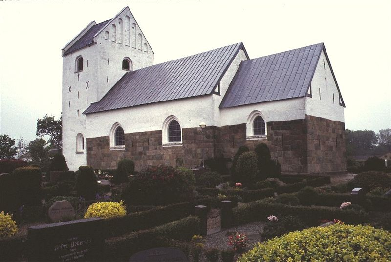 Vester Hjermitslev Kirke i Danmark. Vester Hjermitslev kirke